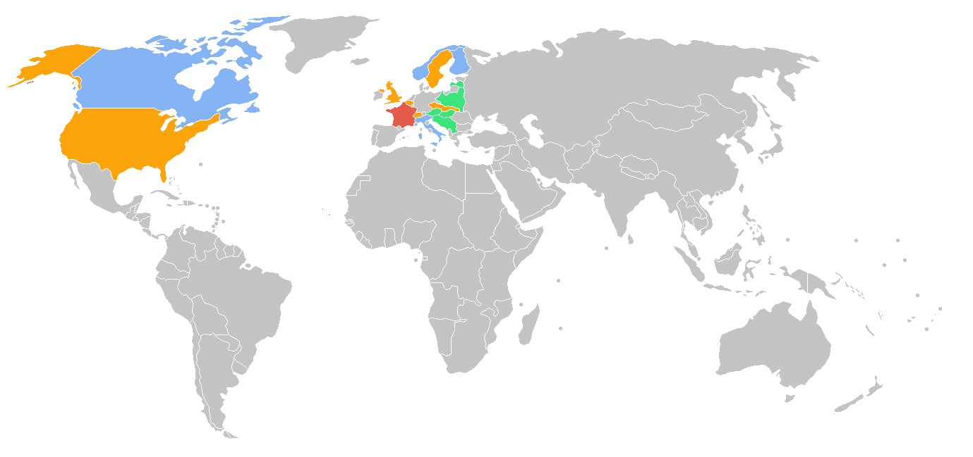 Mapa zúčastněných zemí - přepracováno z Wikipedie (ZOH 1972)